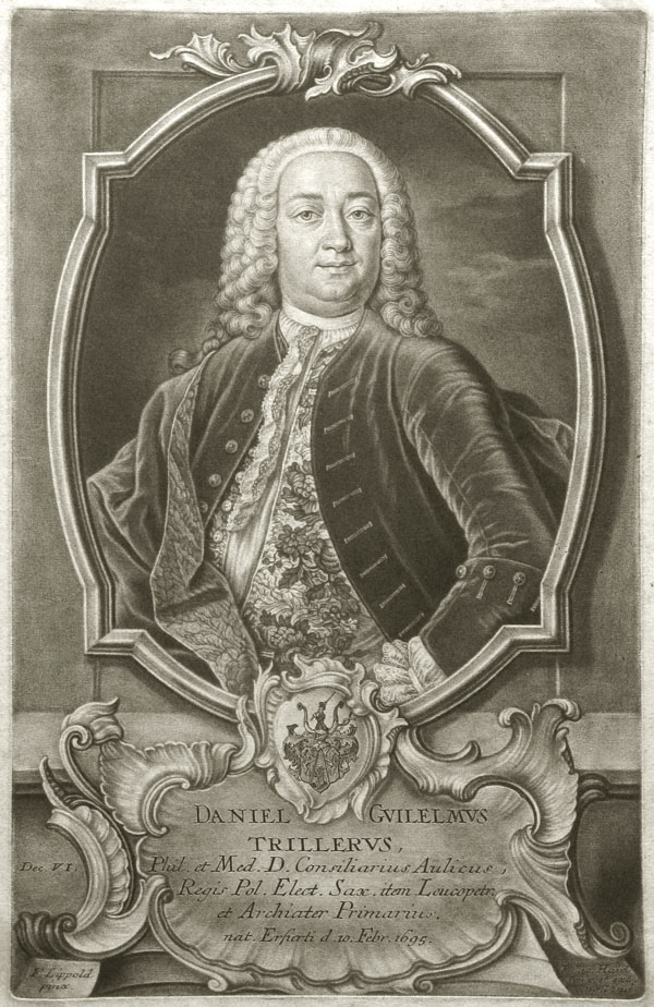 Portrait von Daniel Wilhelm Triller (1695–1782).